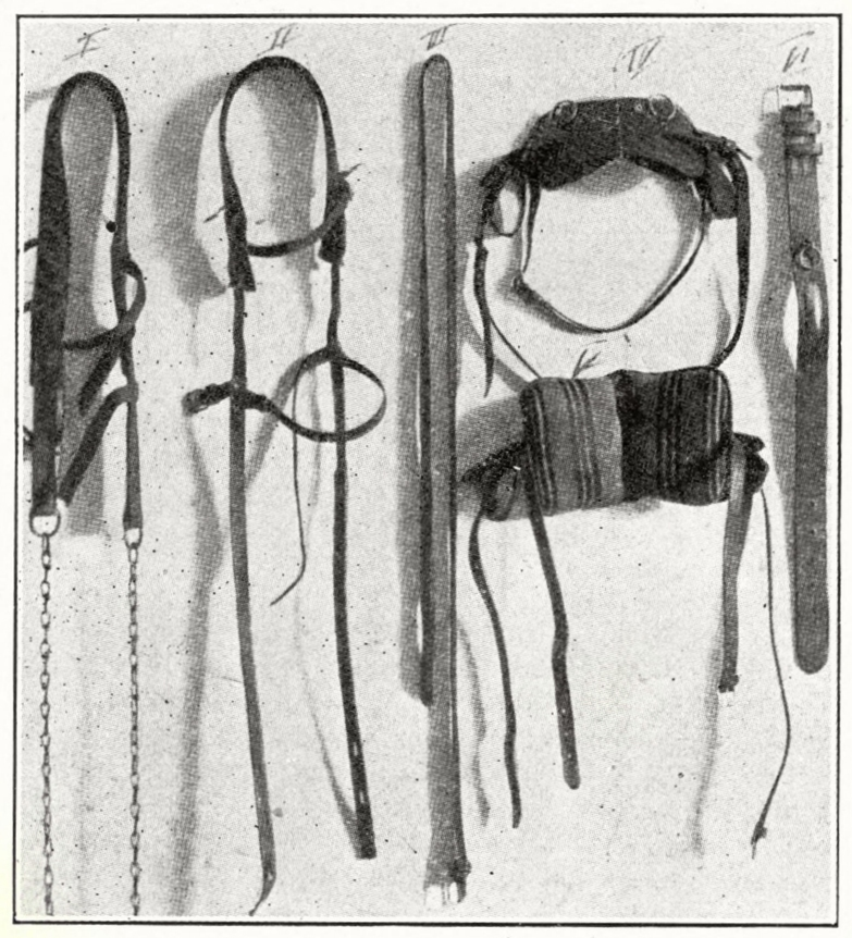 Dog harness from 1915